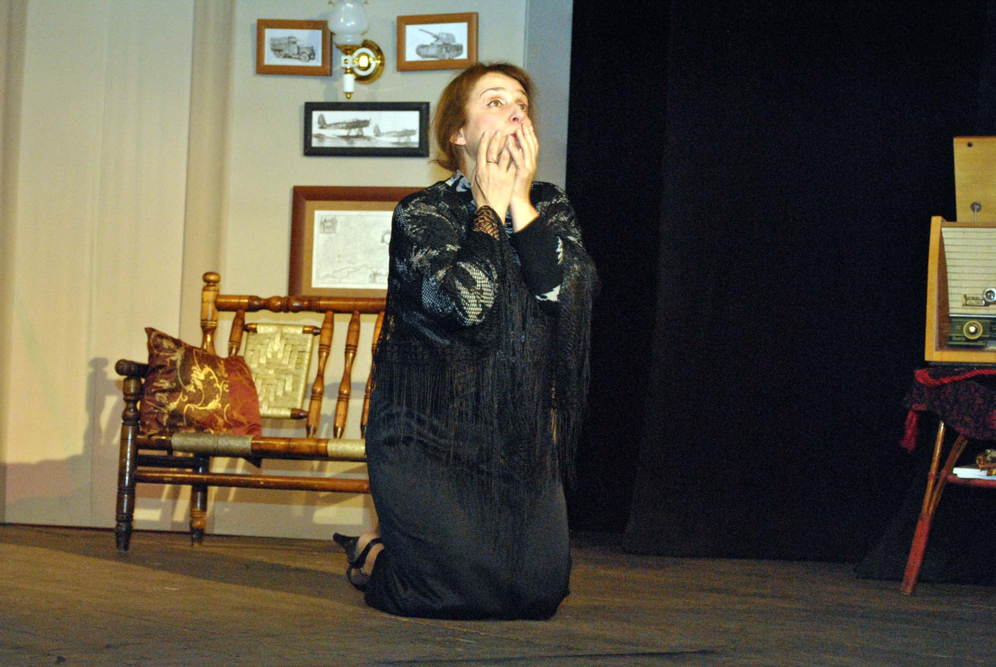 "Մայրը" 2012թ